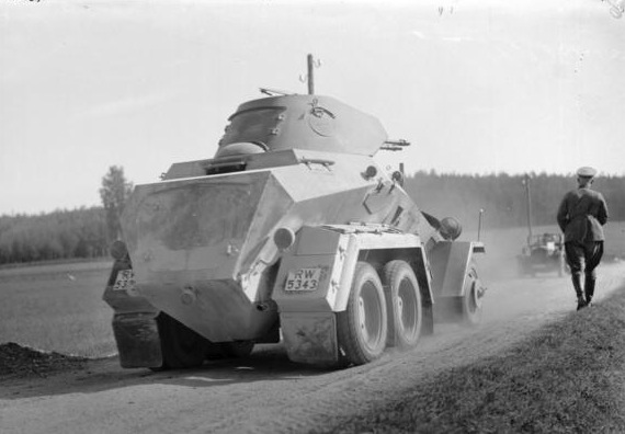 Herbstmanöver des IX. Armeekorps in der Bayrischen Ostmark 1935, Panzer-Spähwagen Information added by Wikimedia users.Spähpanzer Pz.Spw. (6 Rad) (Sd.Kfz. 231)